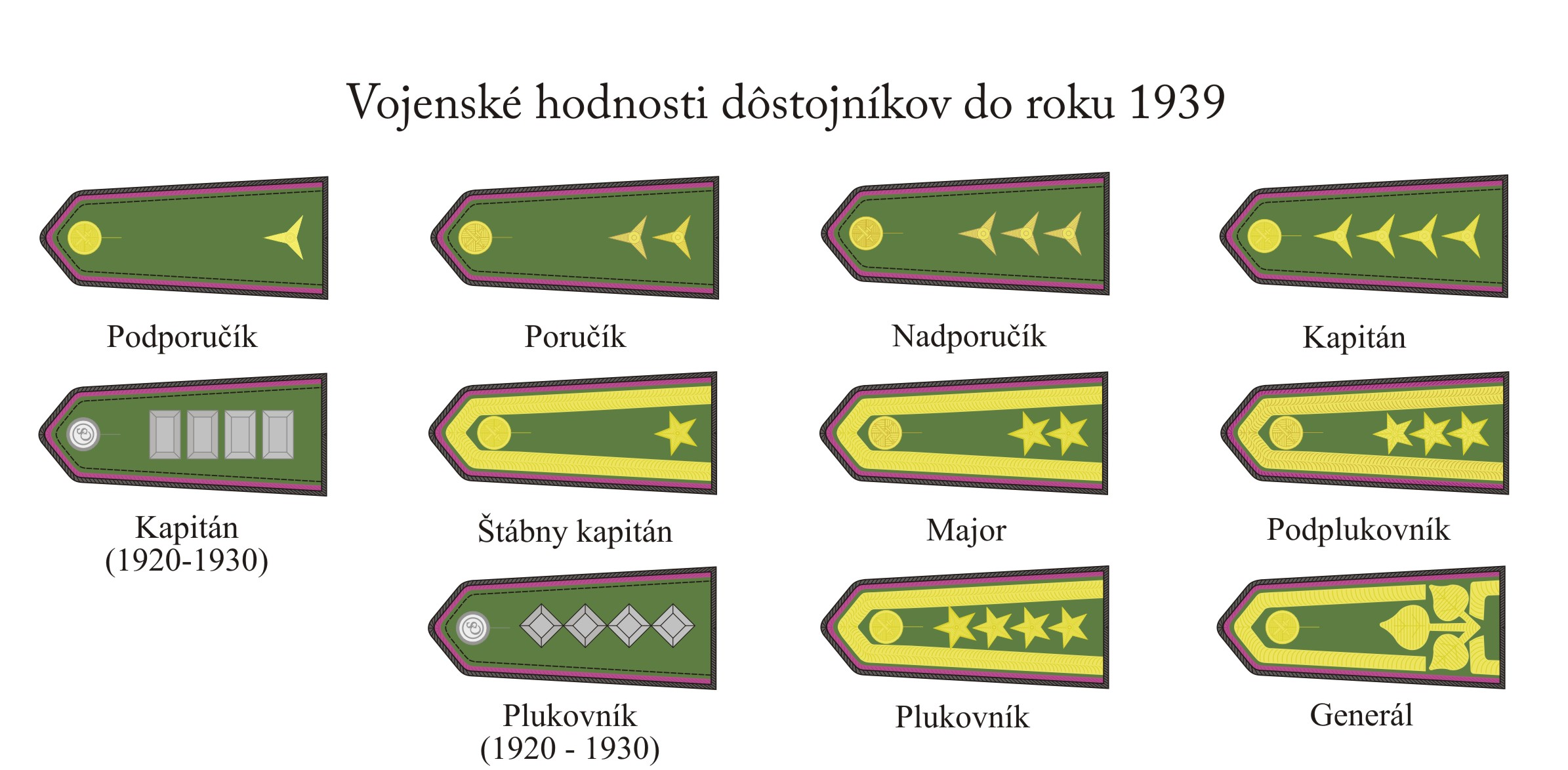 Vojenské hodnosti dôstojníkov a generálov Česko-Slovenskej armády do roku 1939